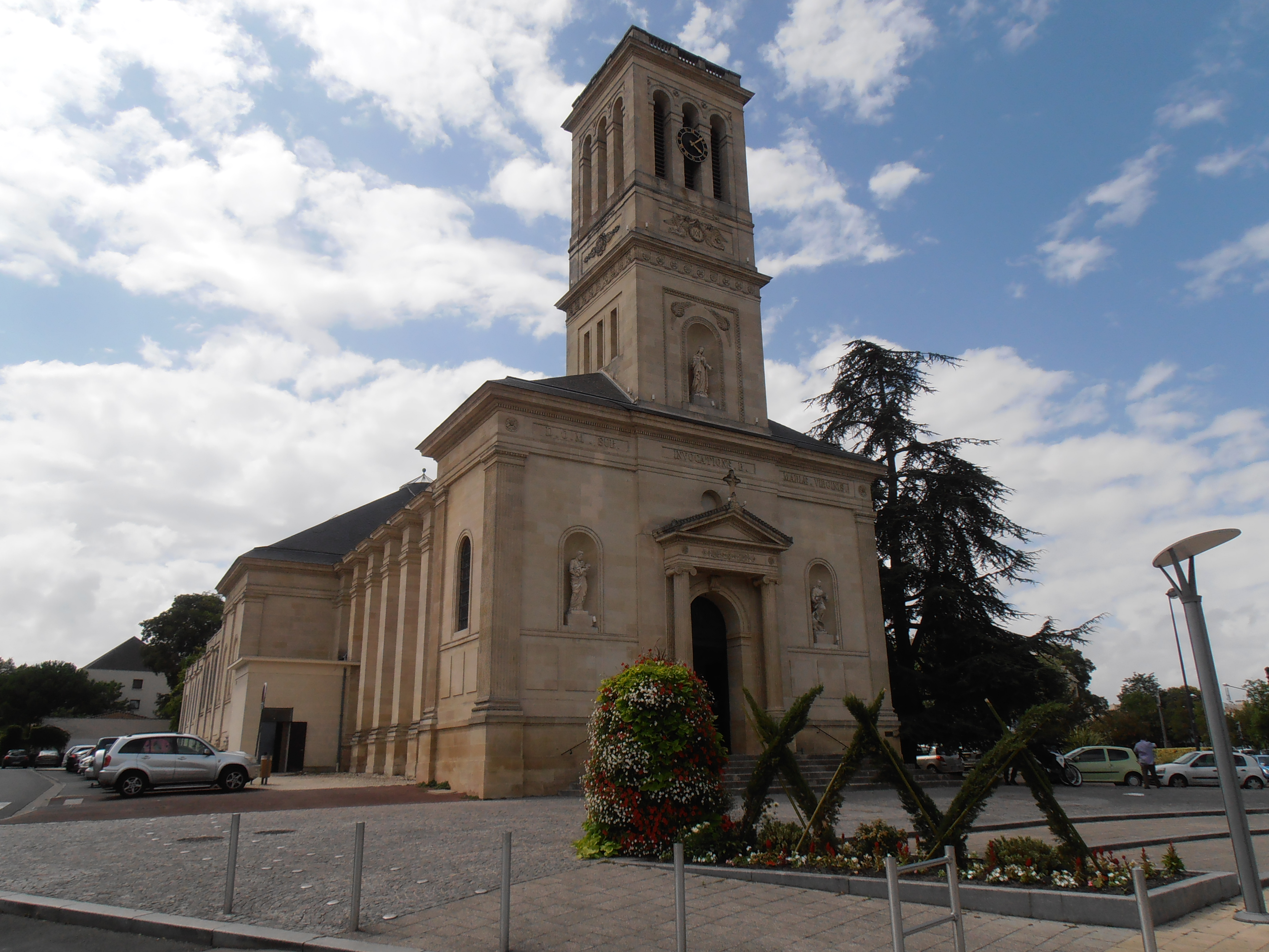 L'église Notre Dame de Talence dans son environnement